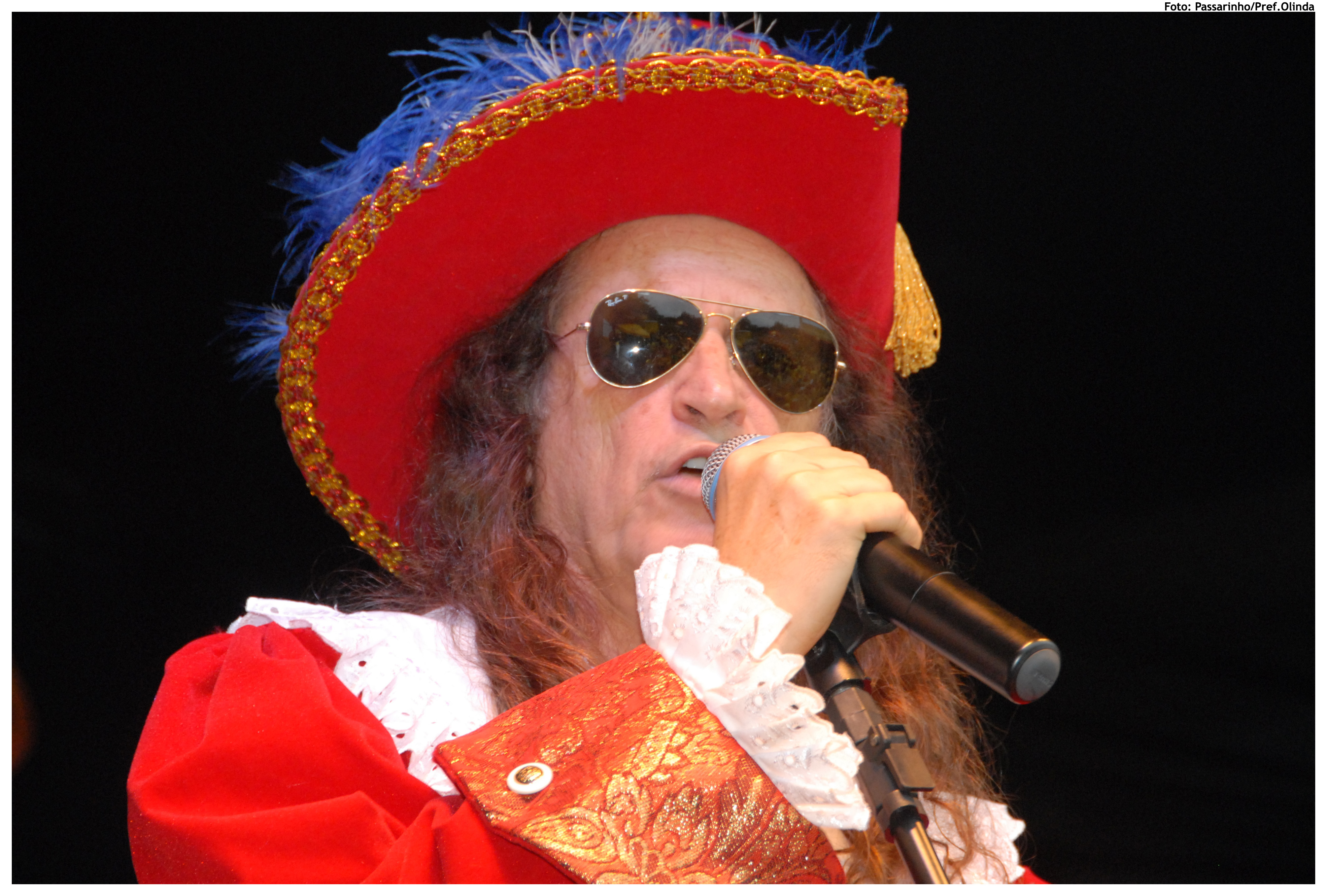 Foto: Passarinho/Pref.Olinda